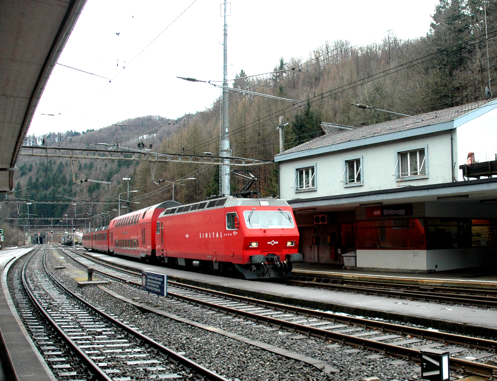 Sihltal–Zürich–Uetliberg-Bahn (SZU) trein met locomotief Re 456 545 te Sihlbrugg.